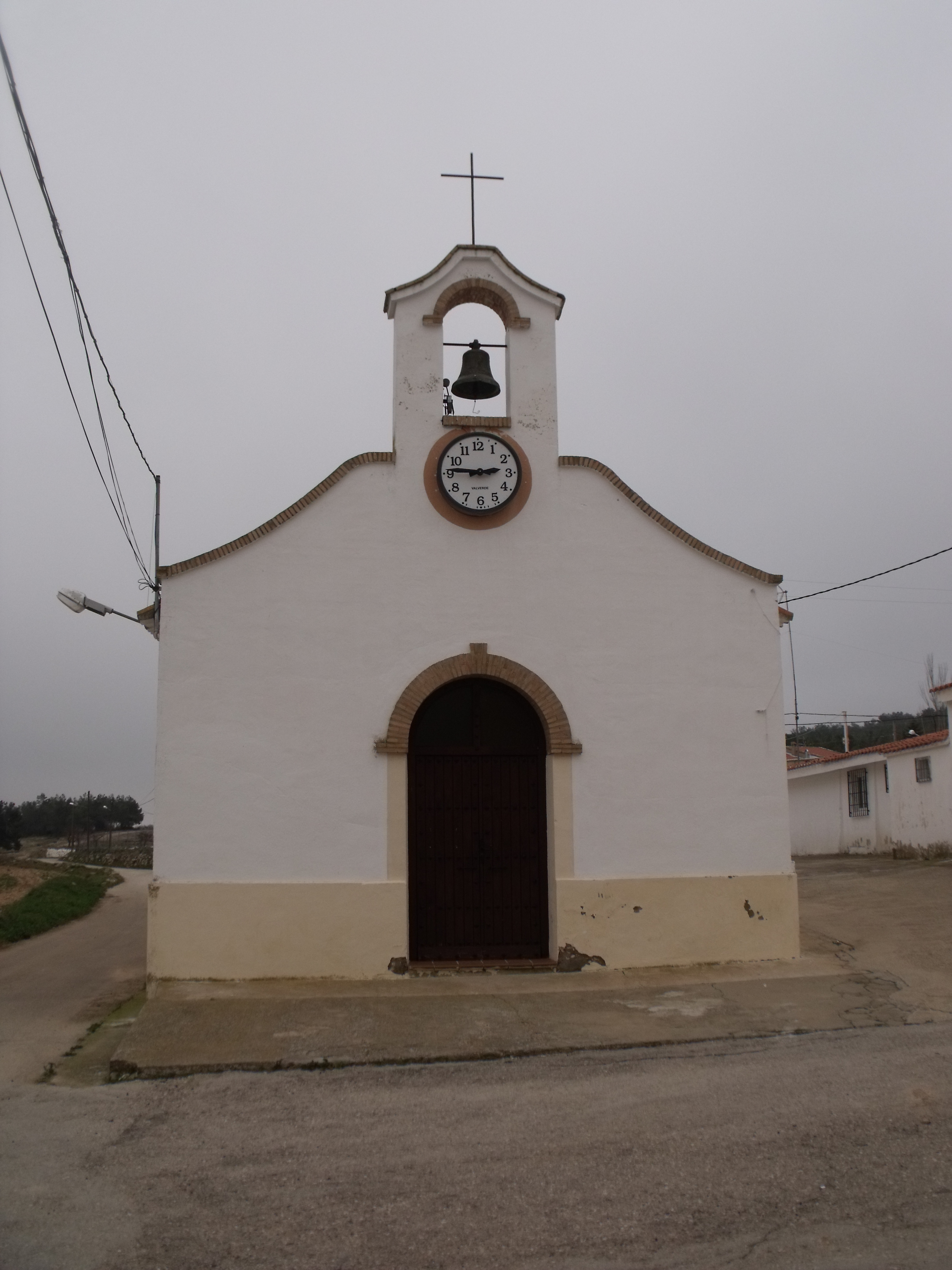 Imagen de la pedanía